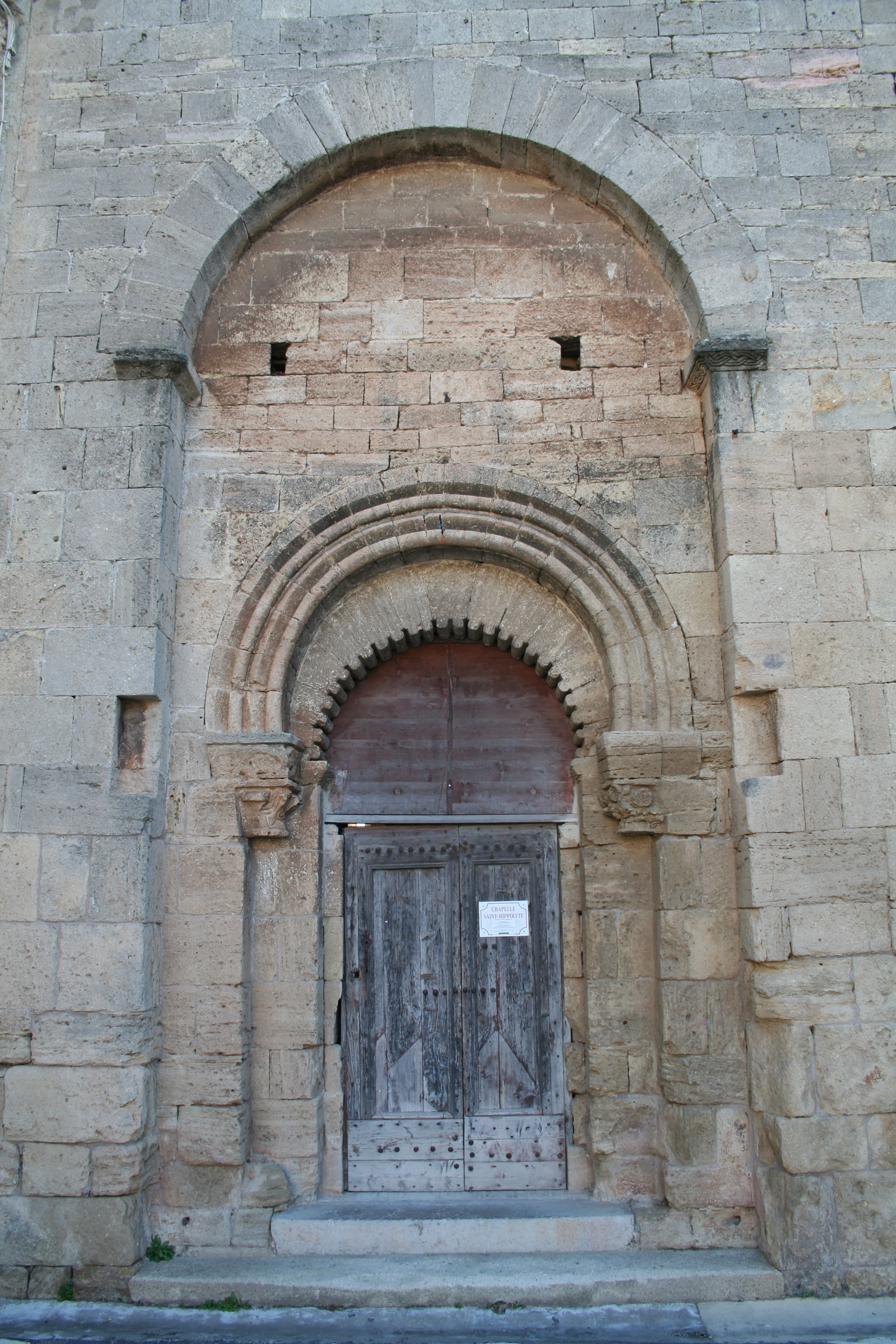 Loupian (Hérault) - église Saint-Hyppolite - portail.